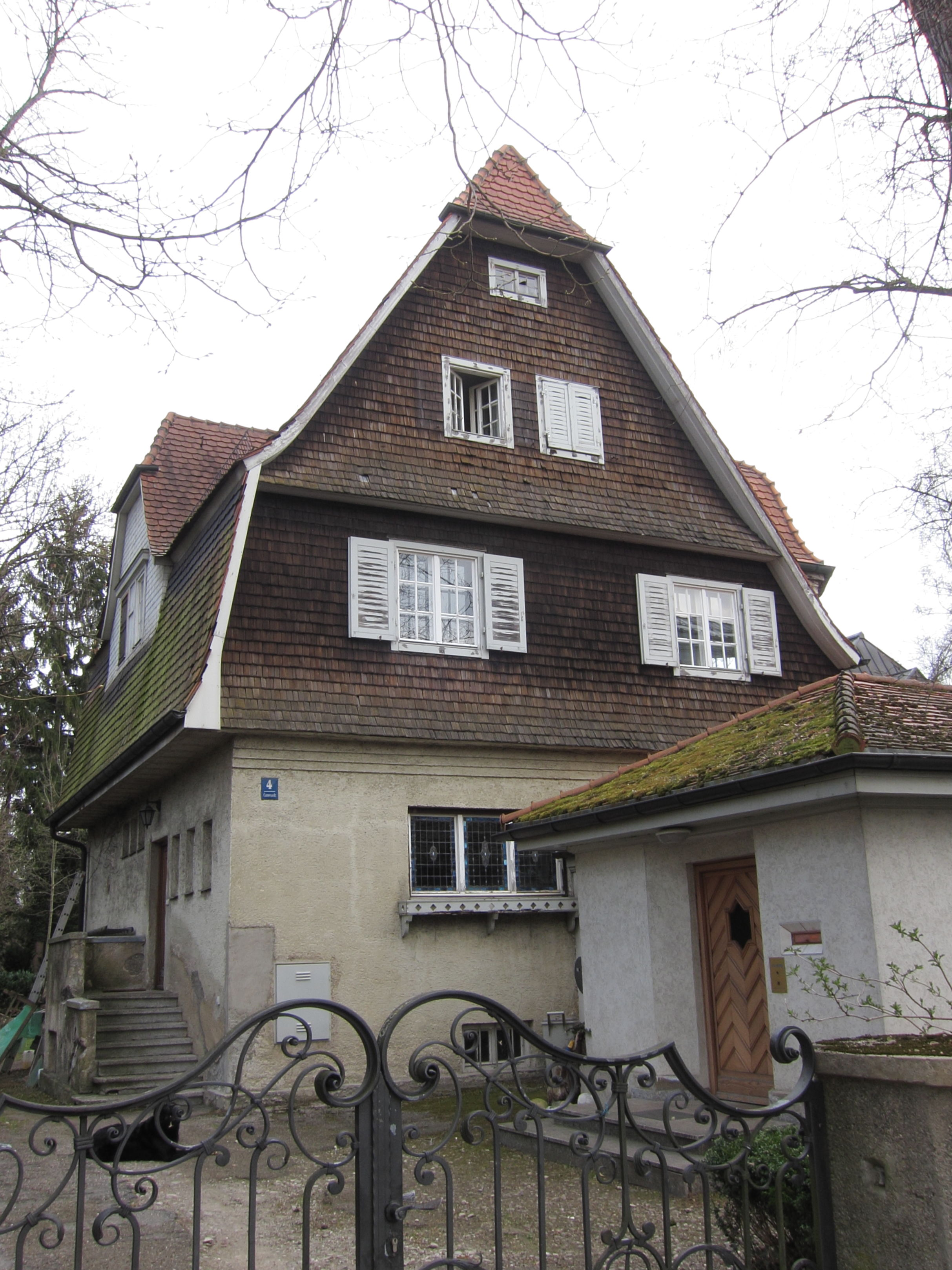 Carossastraße 4; Villa, historisierend, 1910 von Walter Sartorius (Planegg).